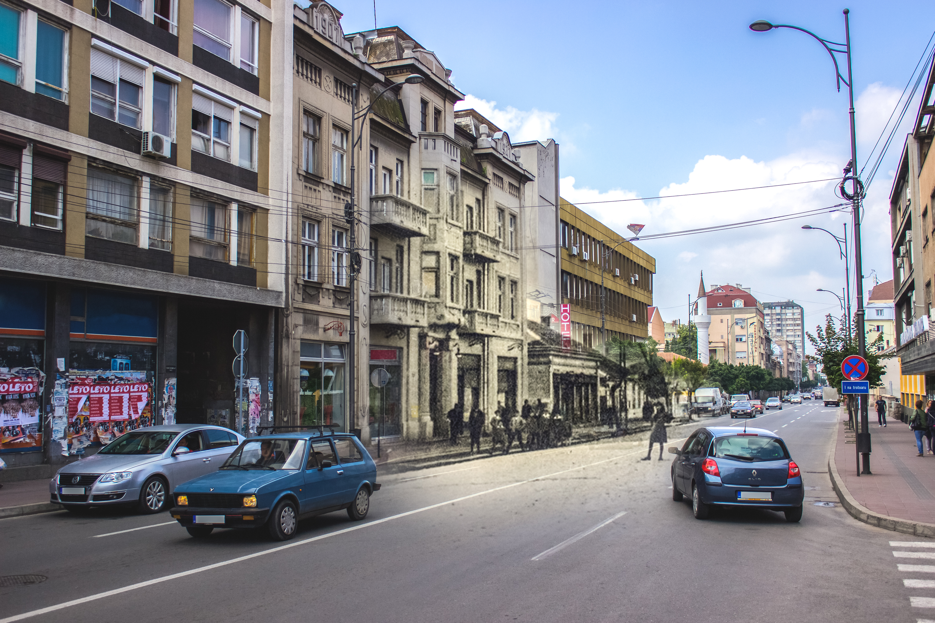 Srpski (latinica): Ulica Milojka Lešjanina